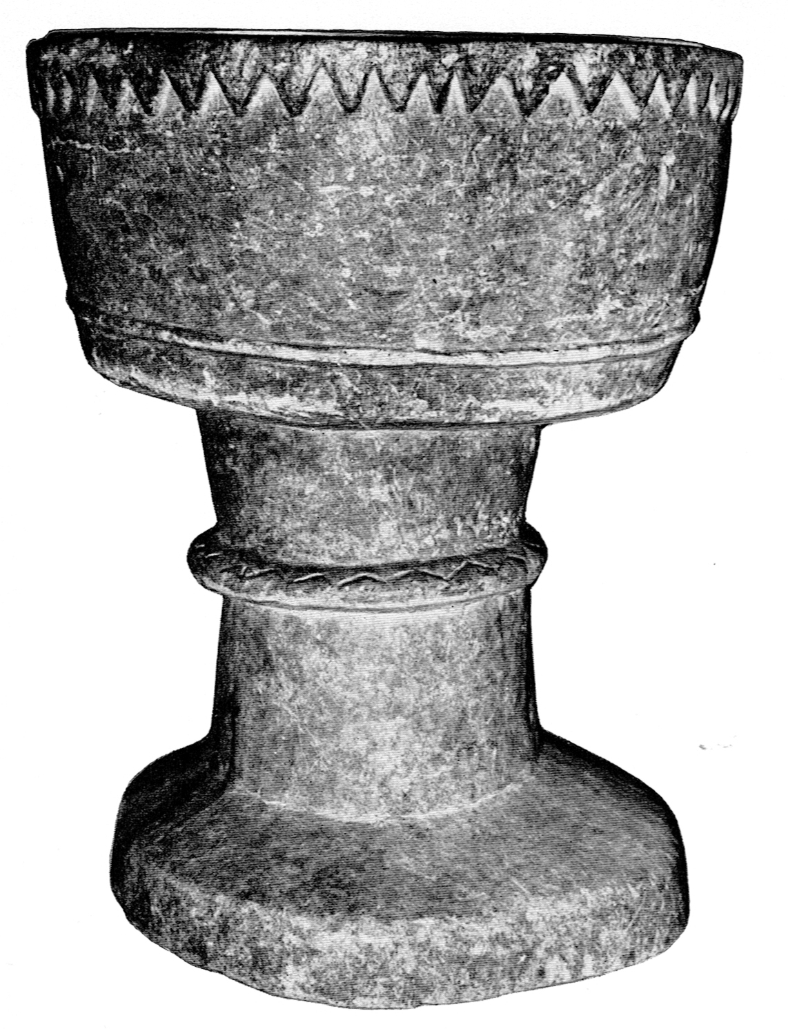 Frändefors kyrka. Dopfunt.